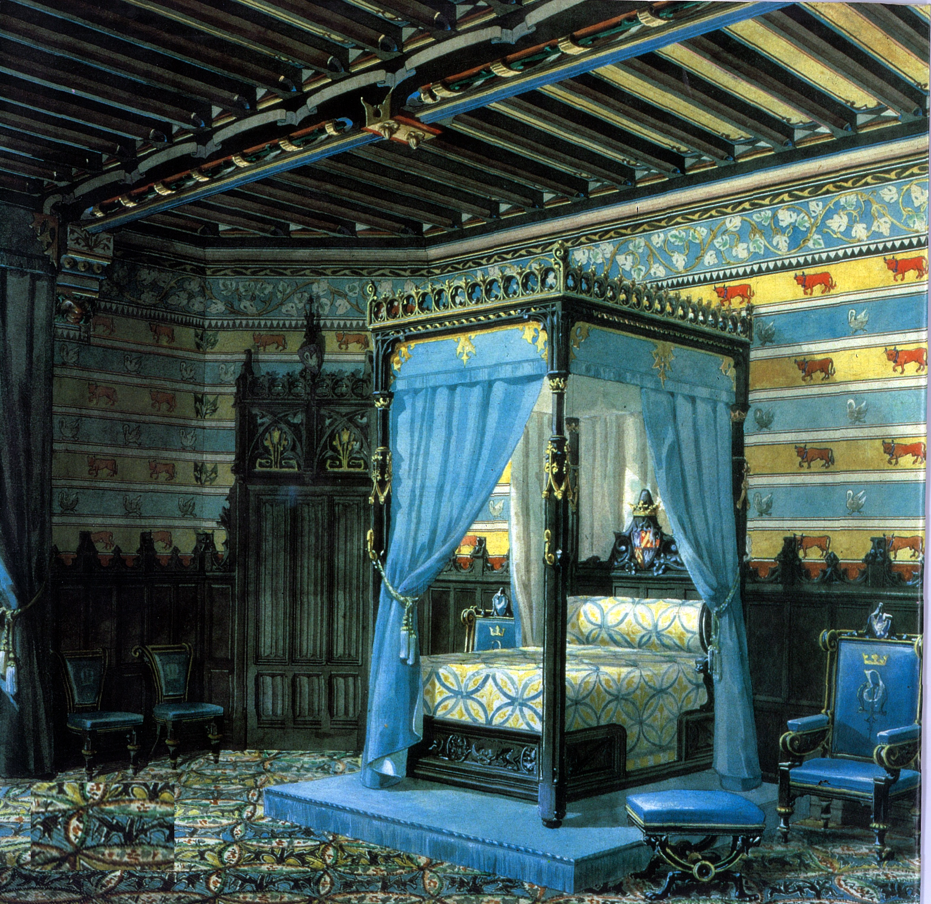 Projet de chambre par Viollet-le-Duc, pour des travaux de réaménagement du château de Roquetaillade vers 1860